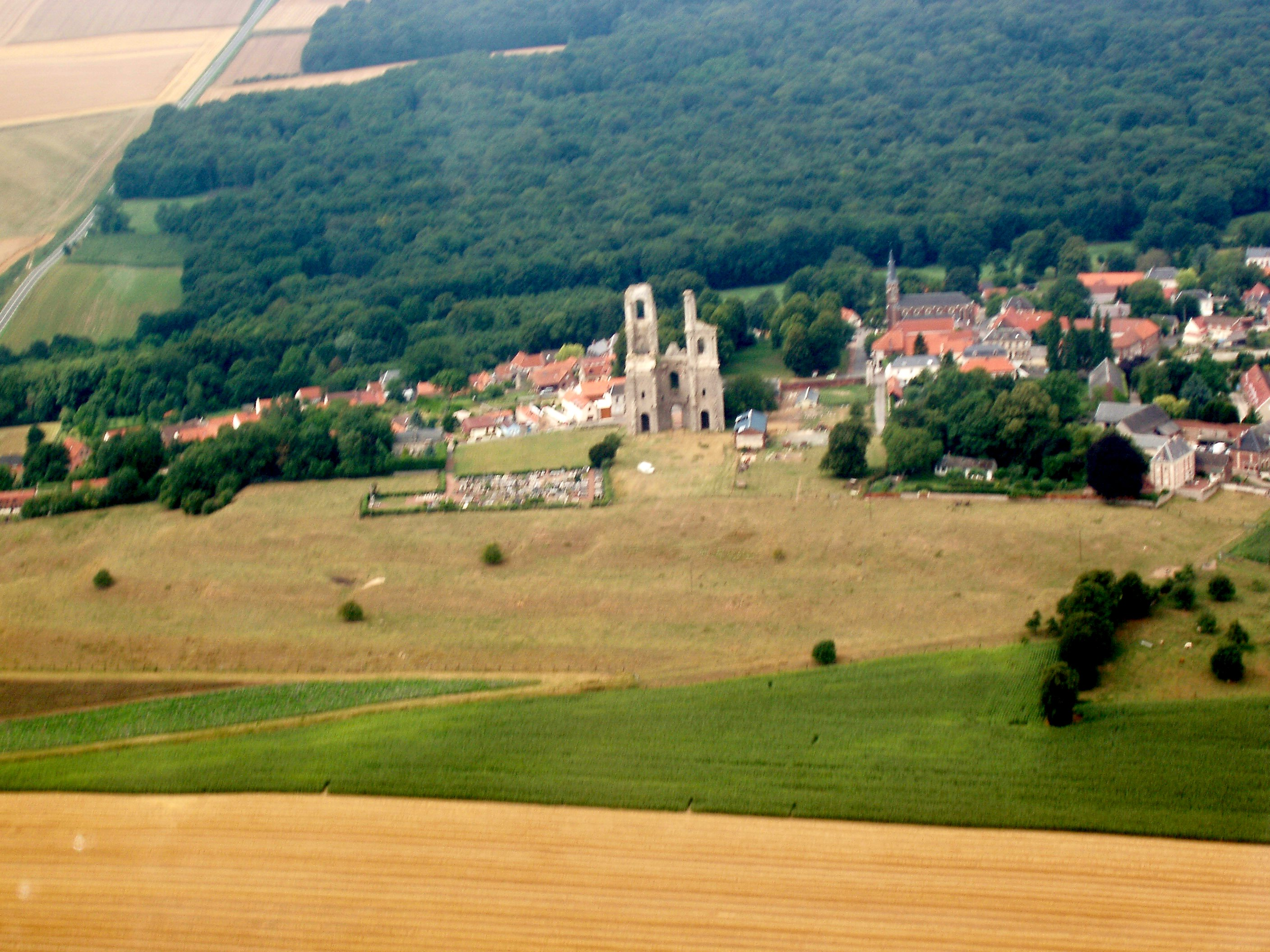 Photographie aérienne de Mont-Saint-Éloi, Pas-de-Calais (62), France, prise vue d'avion (photo personnelle recontrastée avec The Gimp). Sur cette vue on distingue très bien l'Abbaye du mont Saint-Éloi.